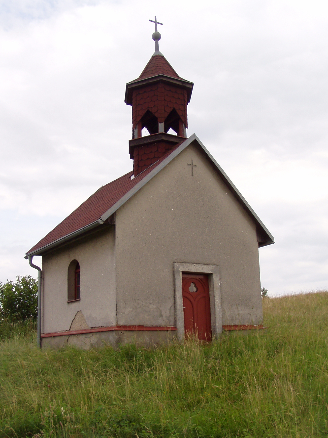 Kaple v Olešnici u Červeného Kostelce